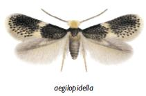 Ectoedemia aegilopidella male